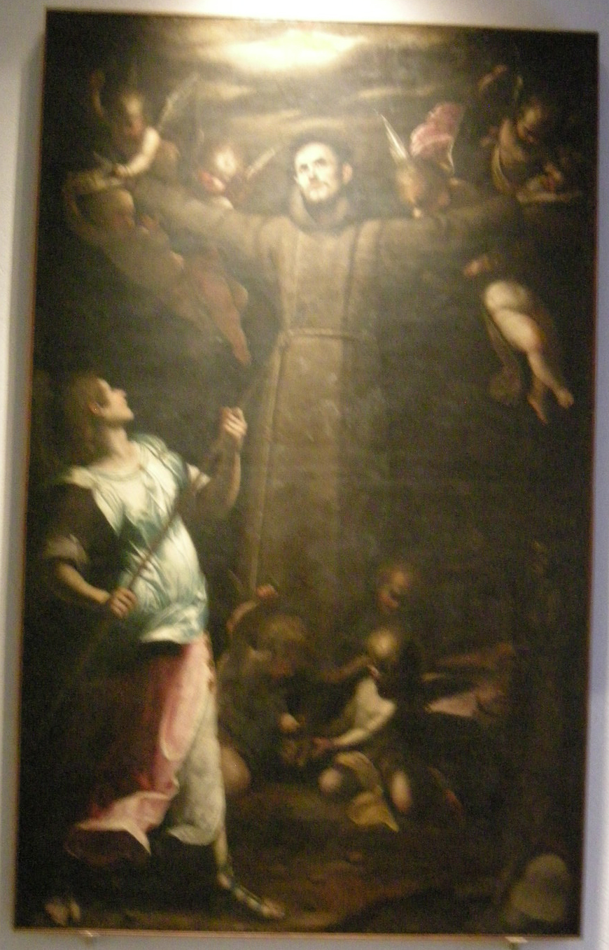 Museo regionale di messina, filippo paladini, san francesco stigmatizzato